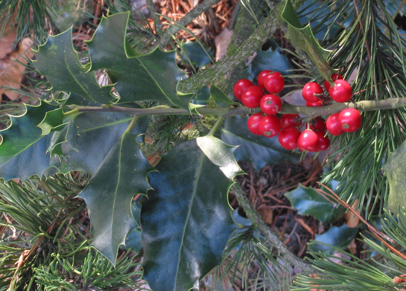 (nl: Hulst besjes) Ilex aquifolium.jpg